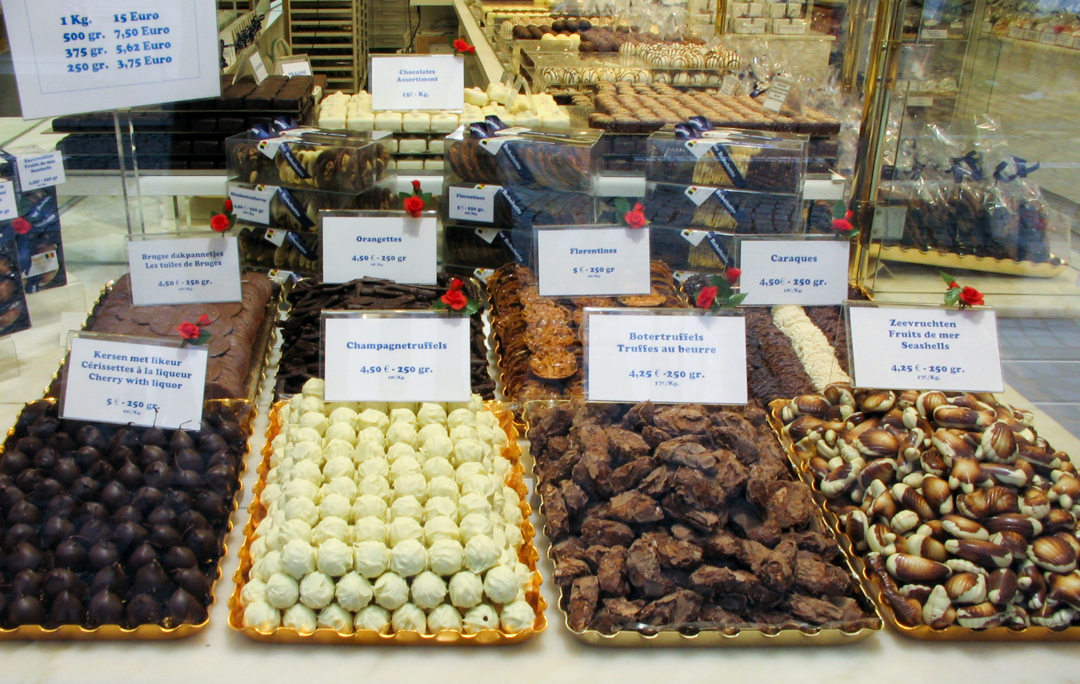 Кондитерская в Брюгге